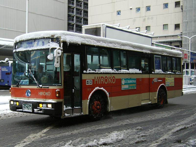 登録番号 広島22く36-55 広島交通所属 2005年12月18日 広島バスセンターにて撮影